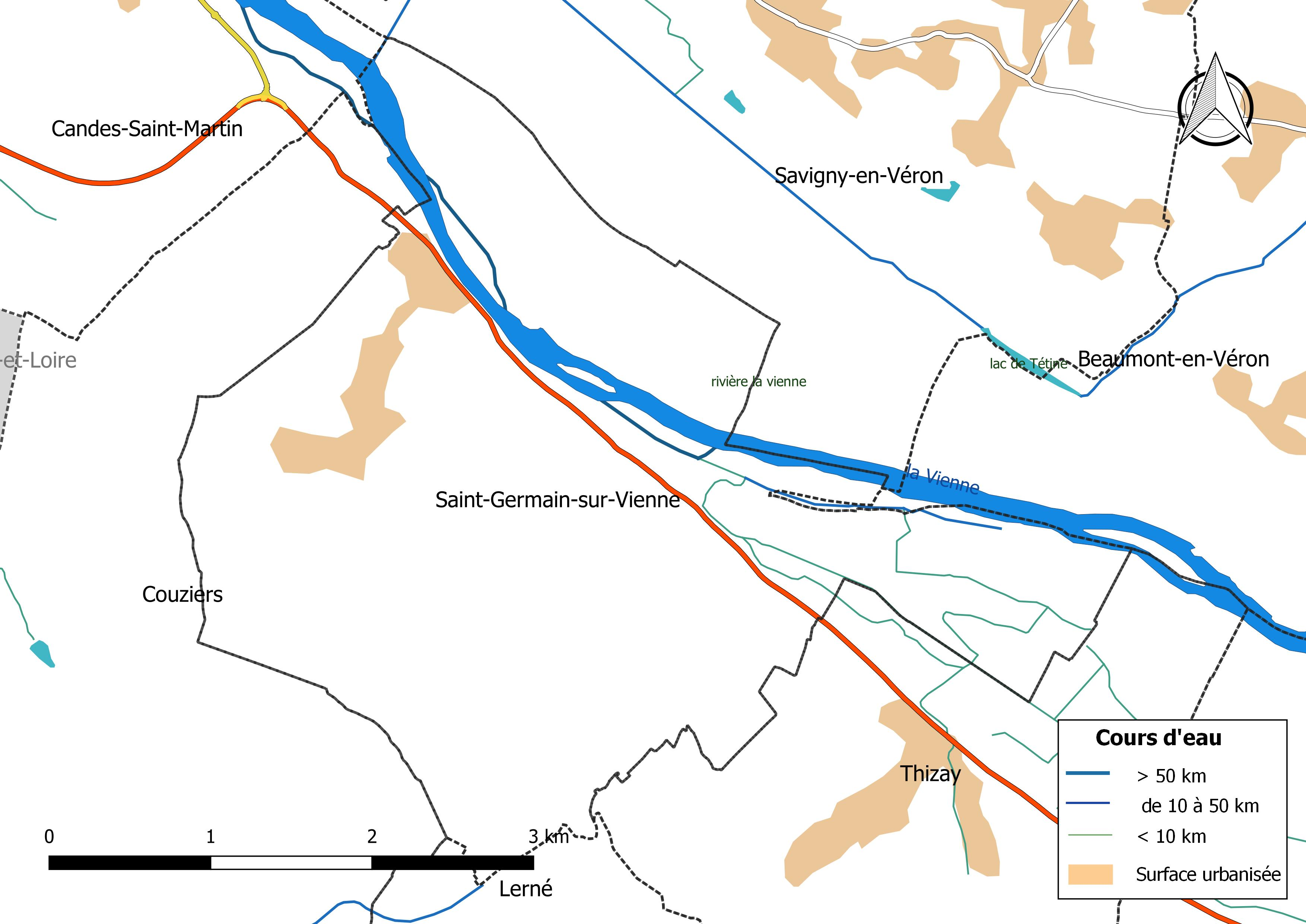 Carte du réseau hydrographique de la commune de Saint-Germain-sur-Vienne (France).